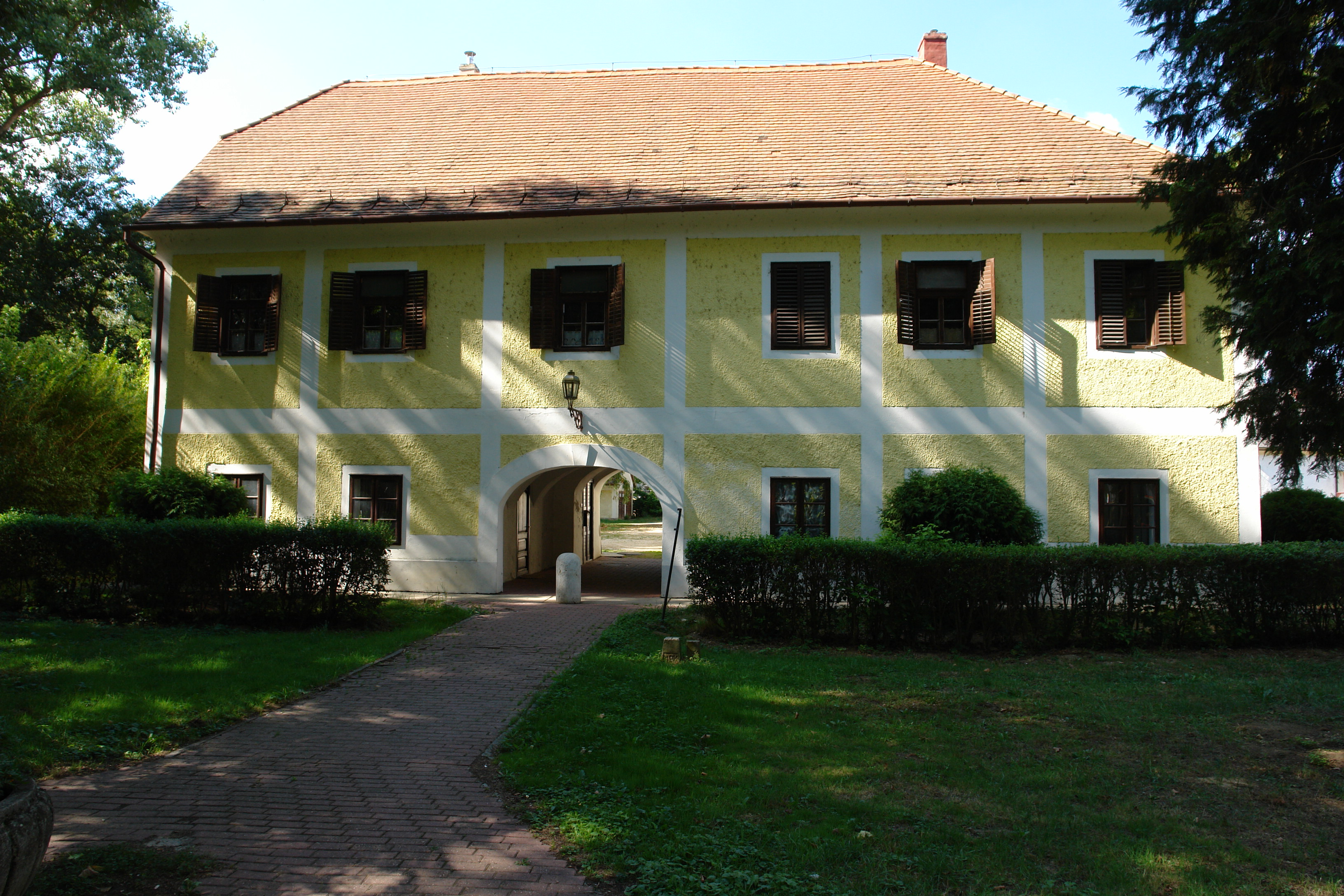 Kiskastély, Zalaszentgrót, Zala utca 3. This is a photo of a monument in Hungary. Identifier: 11111